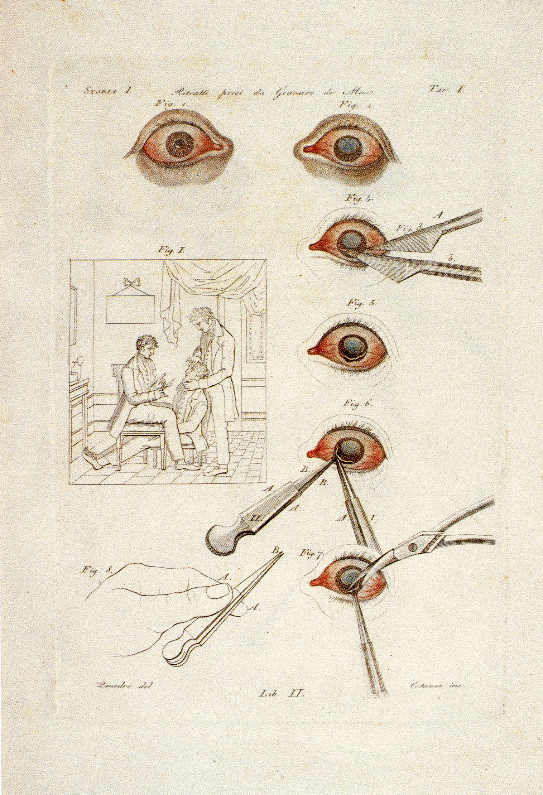 Riproduzione della I Tavola in rame tratta da "Annotazioni pratiche sulle malattie degli occhi" di Giovanni Battista Quadri